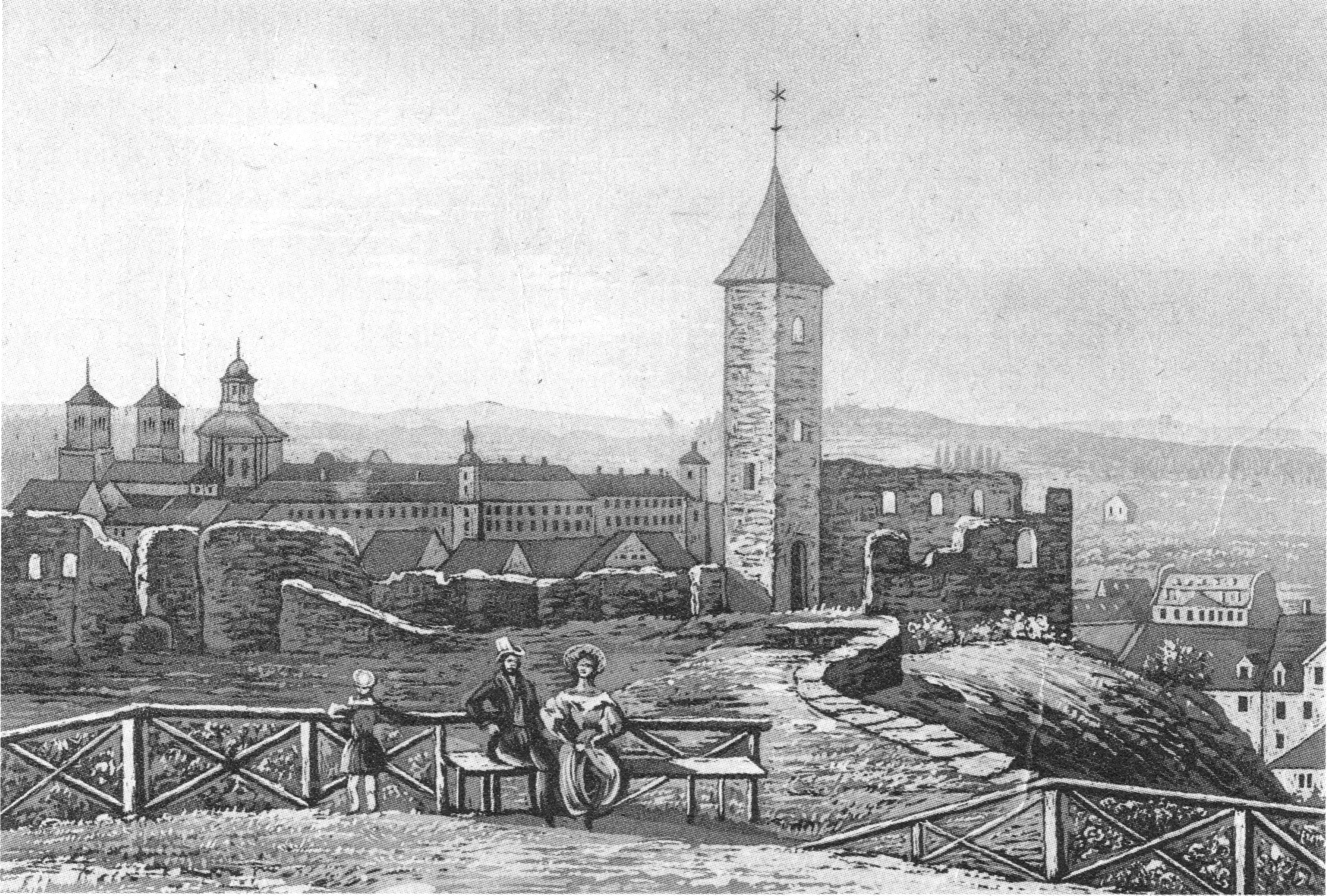 Die Burghalde in Kempten zu Beginn des 19. Jahrhunderts.